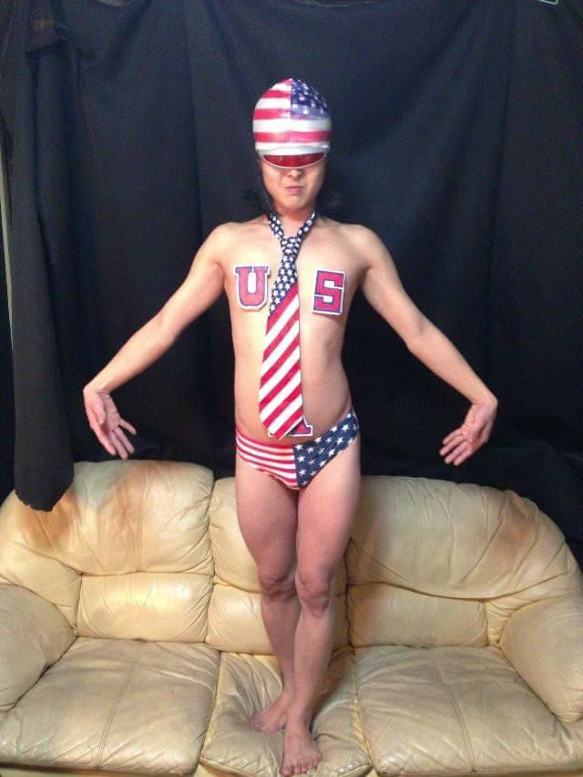 幸せ管理人時代「アメリカンヒーロー」